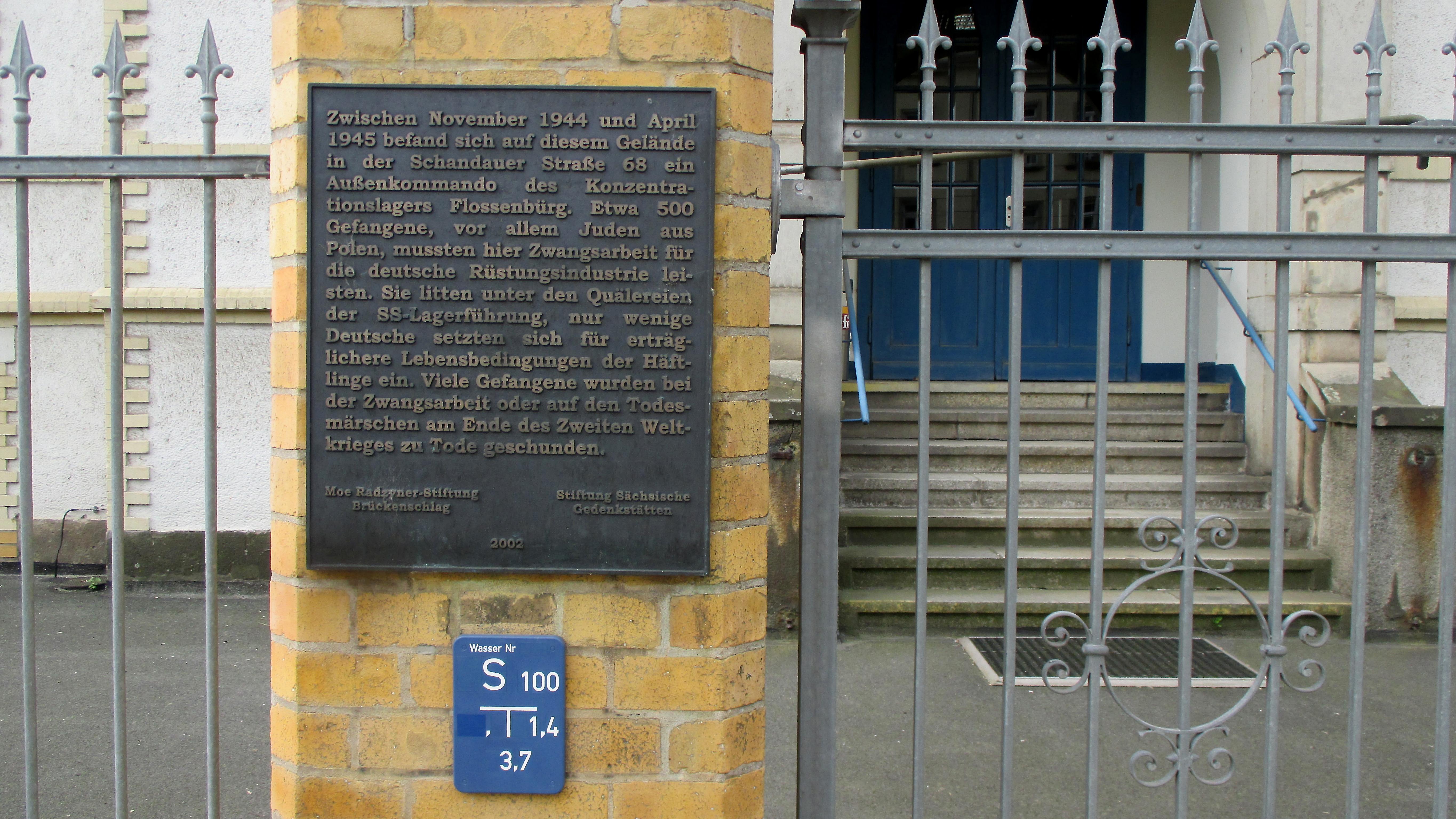 +f6 Cigarettenfabrik - Schandauer Straße 68 - Dresden - Gedenkstätte - Stiftung Sächsische Gedenkstätten - Bild 001